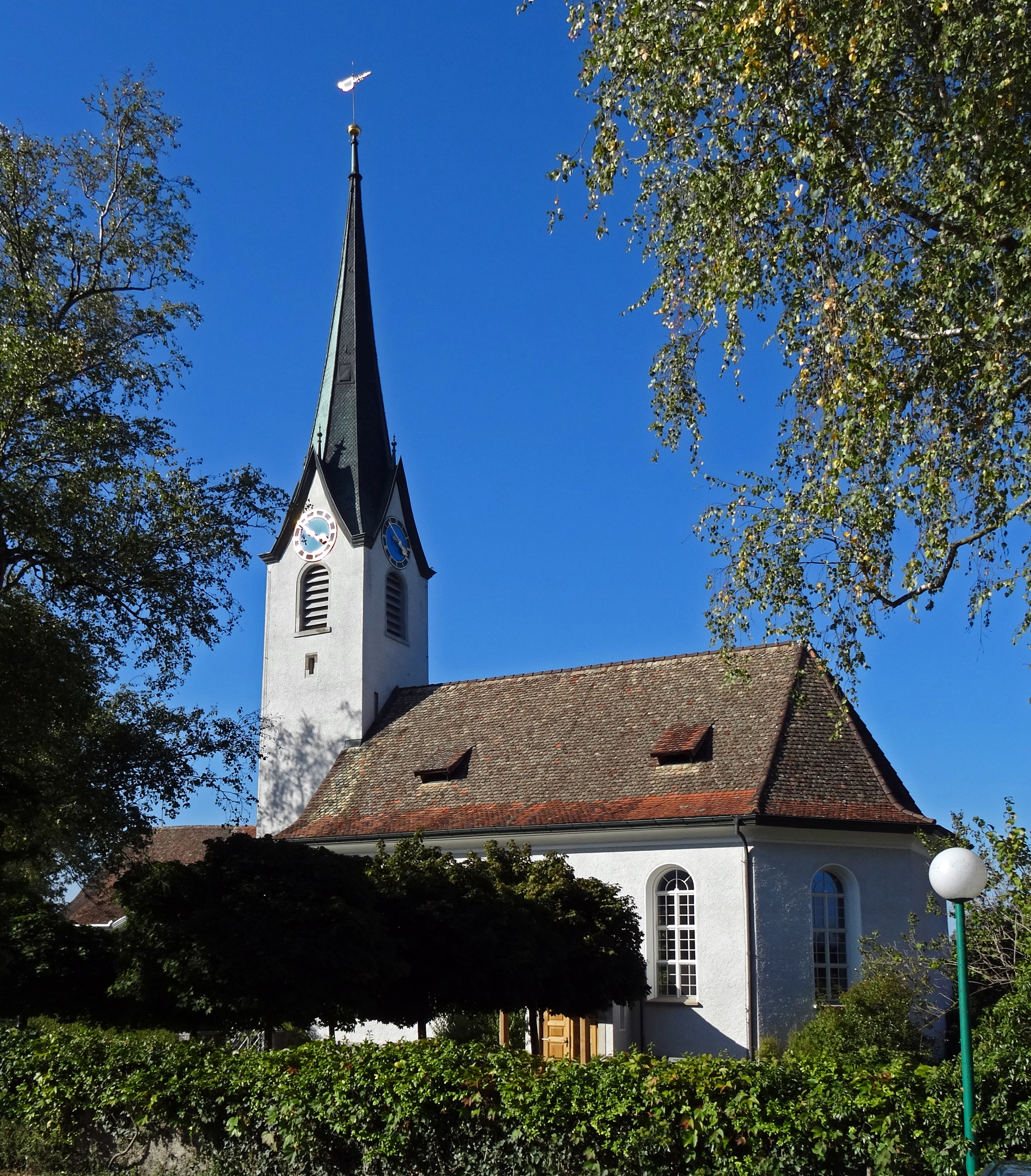 Evangelische Kirche in Erlen, Kanton Thurgau